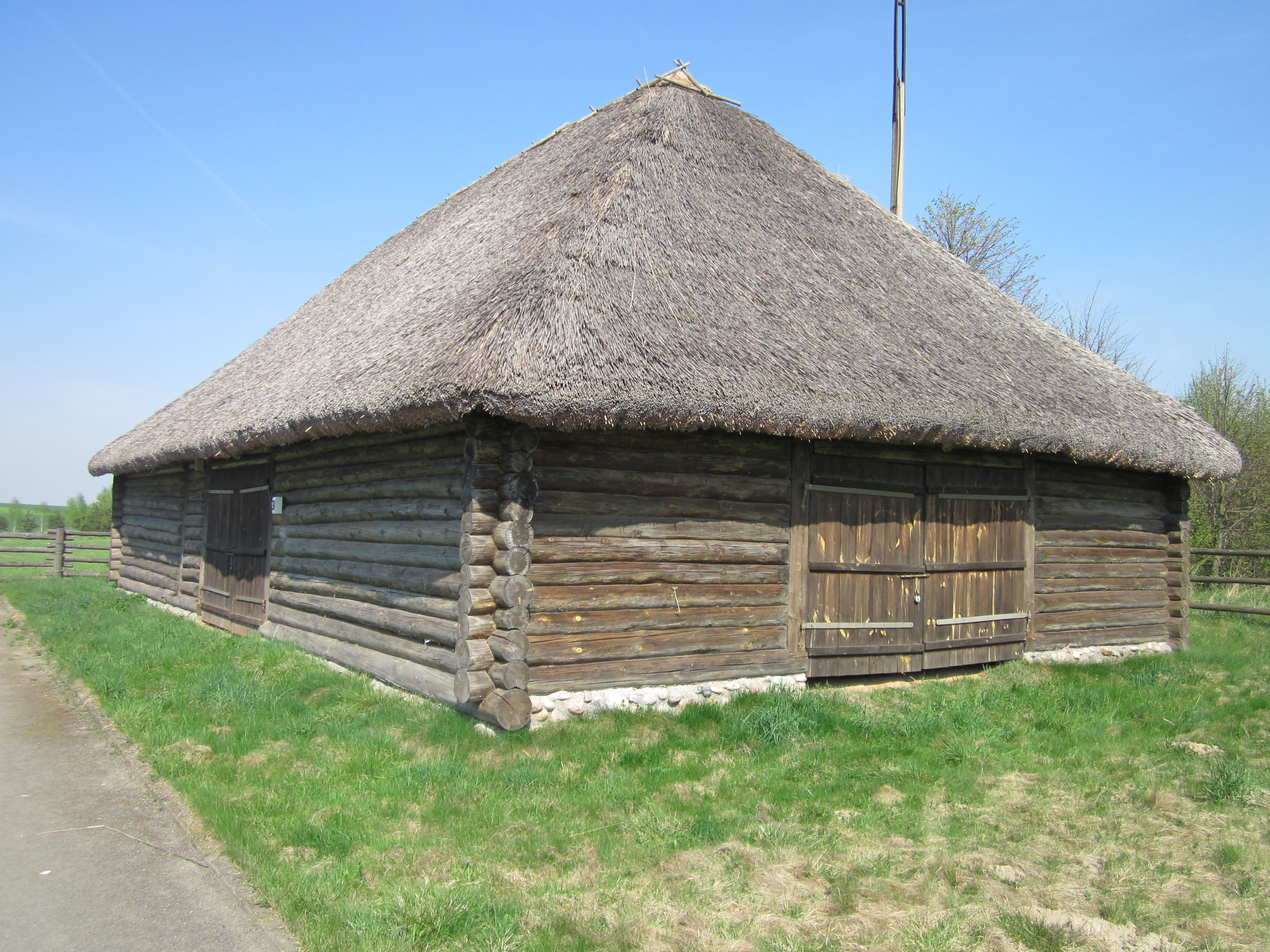 Беларуская (тарашкевіца): Сядзіба-мэмарыял А. Міцкевіча. хутар Завосьсе This is a photo of Belarusian heritage monument. Reference number: 113Г000056 ( WLM)